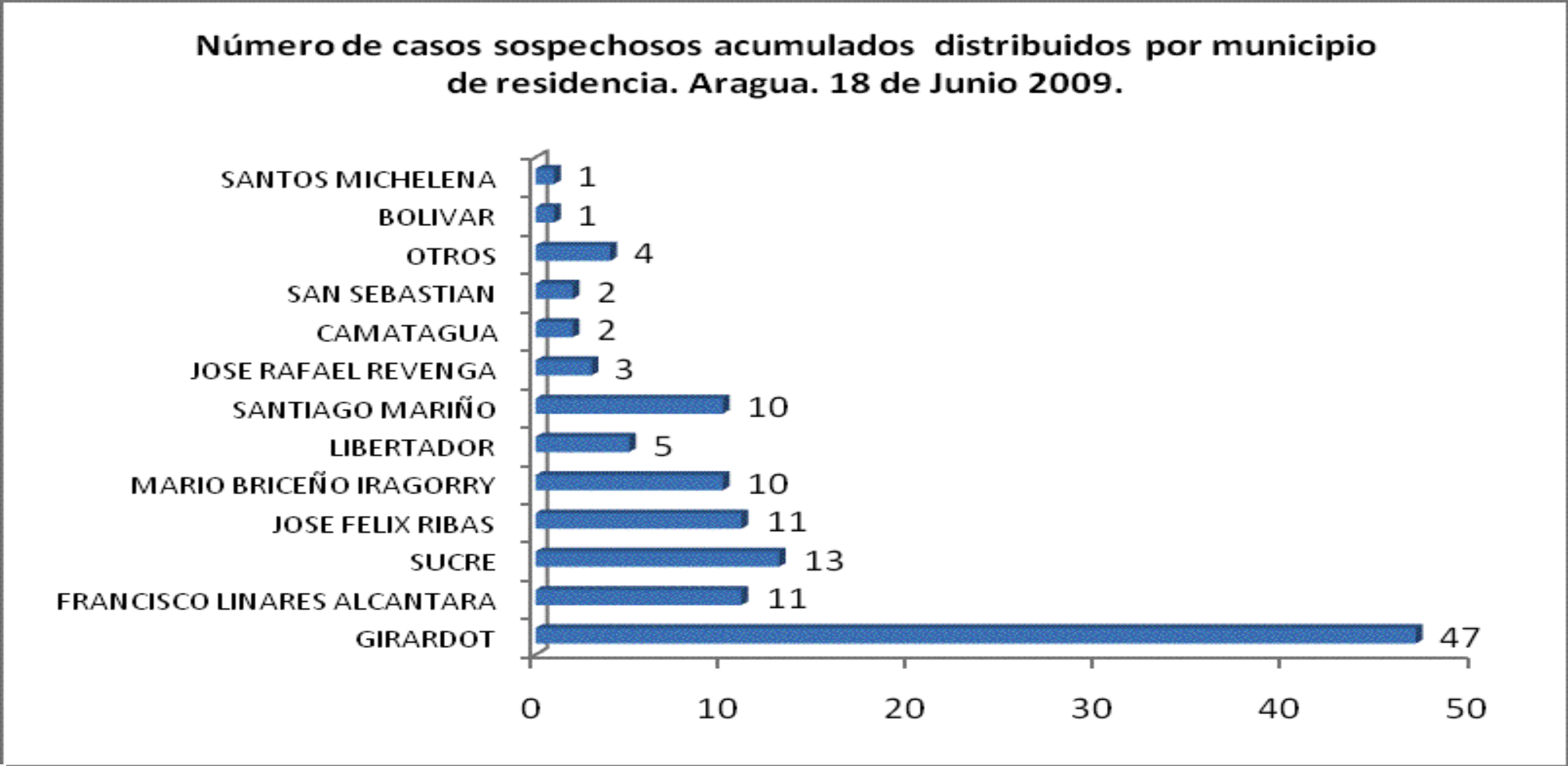 Número de casos sospechosos por municipios del estado Aragua, reportados por Corposalud el 18 de junio, 2009.